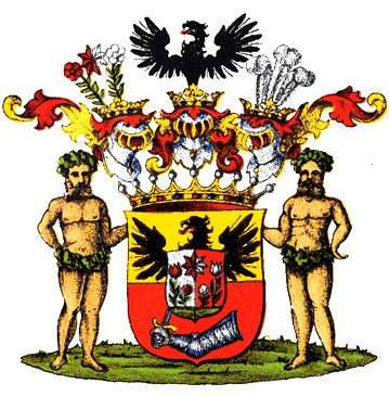 Dunteni suguvõsa krahvivapp